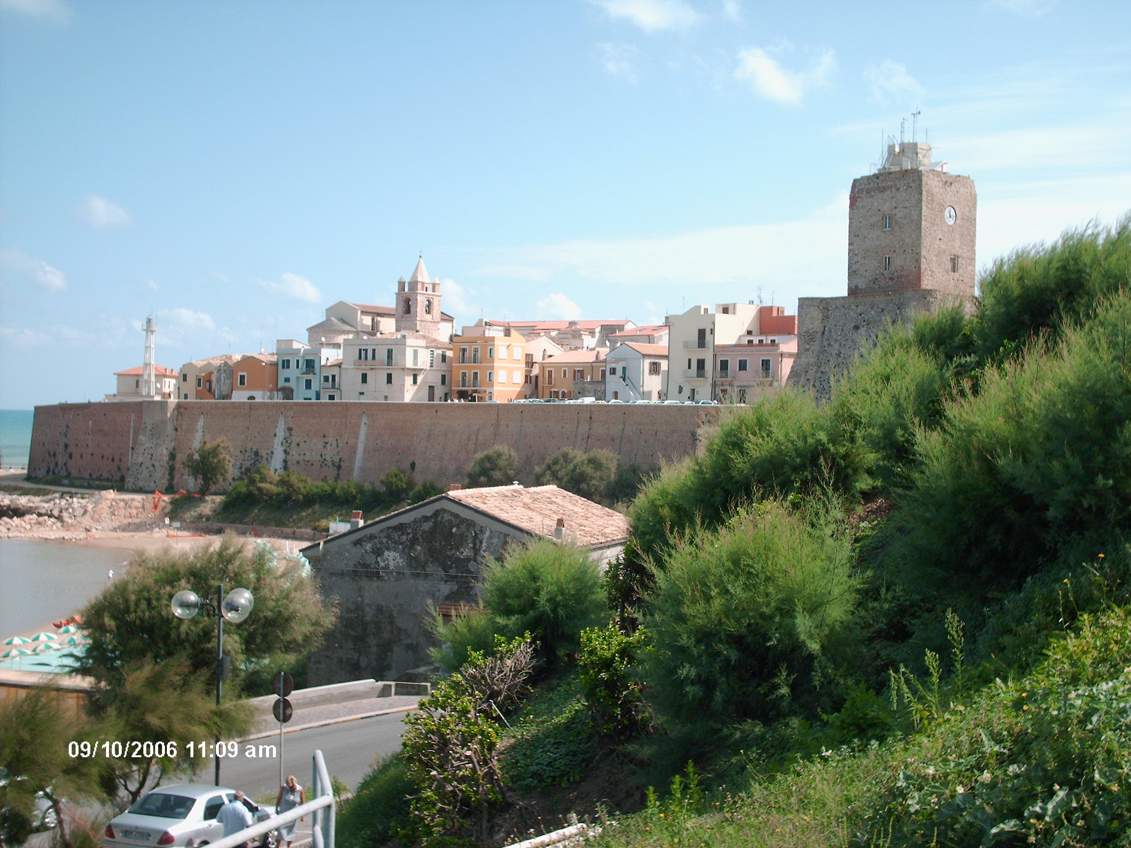 Borgo antico di Termoli visto dal mare